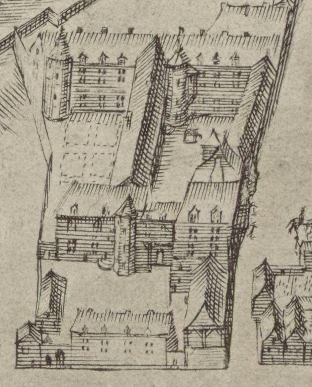 Ausschnitt aus dem Stadtplan von Compiègne mit der damaligen Königsresidenz